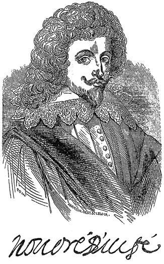 Sujet : Portrait d'Honoré d'Urfé Source : La Magasin pittoresque de 1841 Graveur : EDM, Andrew, Best et Leloir Licence : Licence GFDL. Auteur : Utilisateur:Valérie75 Utilisateur:Valérie75